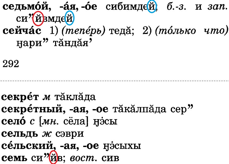 Совместное использование кратки и бревиса